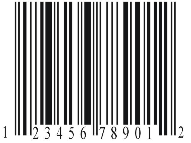 Do Vương Ngân Hà tạo ra, đưa vào sử dụng trong phạm vi công cộng.